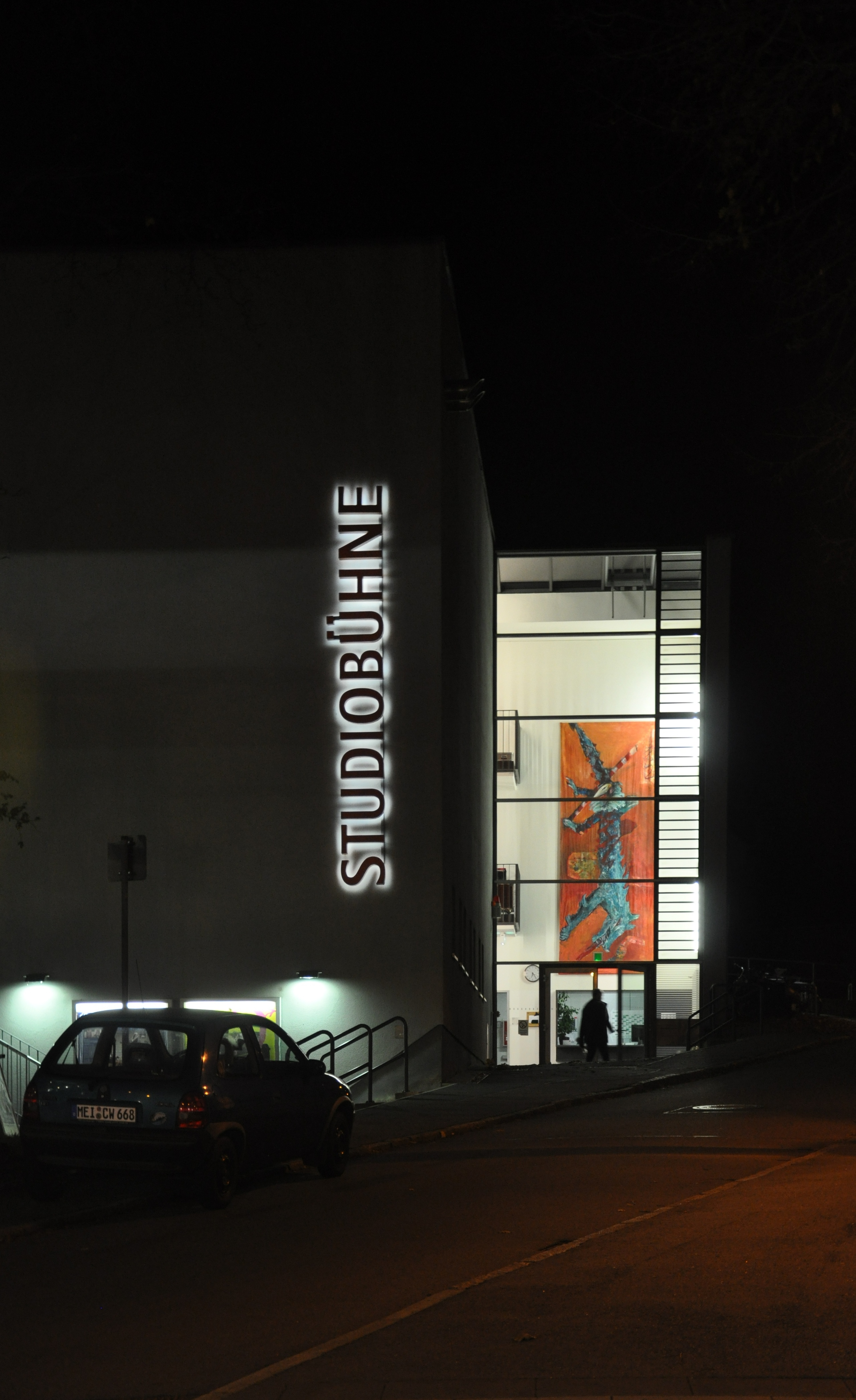 Radebeul (bei Dresden), Landesbühnen Sachsen Studiobühne (nachts)